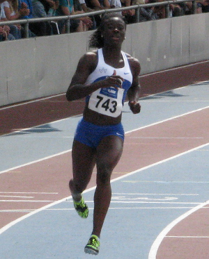 Yasmin Kwadwo beim DLV WM-Testwettkampf 2011 im Stadion der MTG Mannheim.